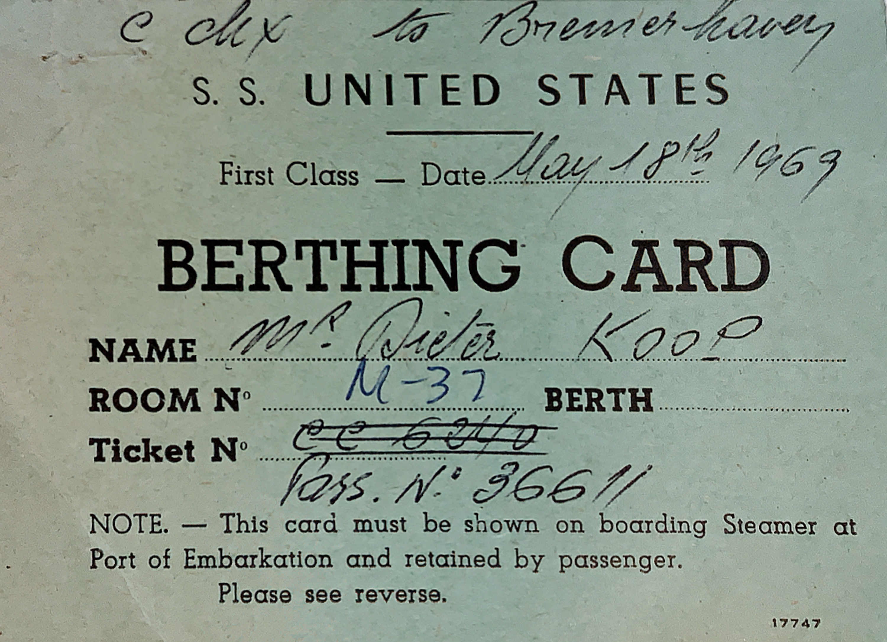 Bordkarte des damaligen Passagierdampfers United States Lines NY - Bemerhaven